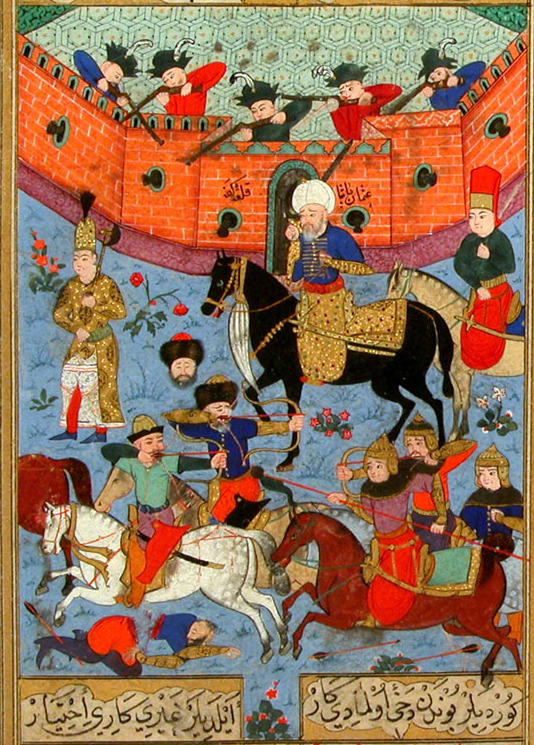 Secaatname 0213